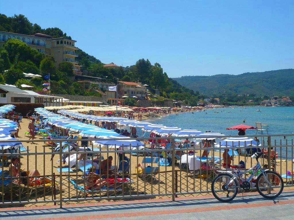 La spiaggia del pozzilo tra s.maria e s.marco di castellabate (salerno)